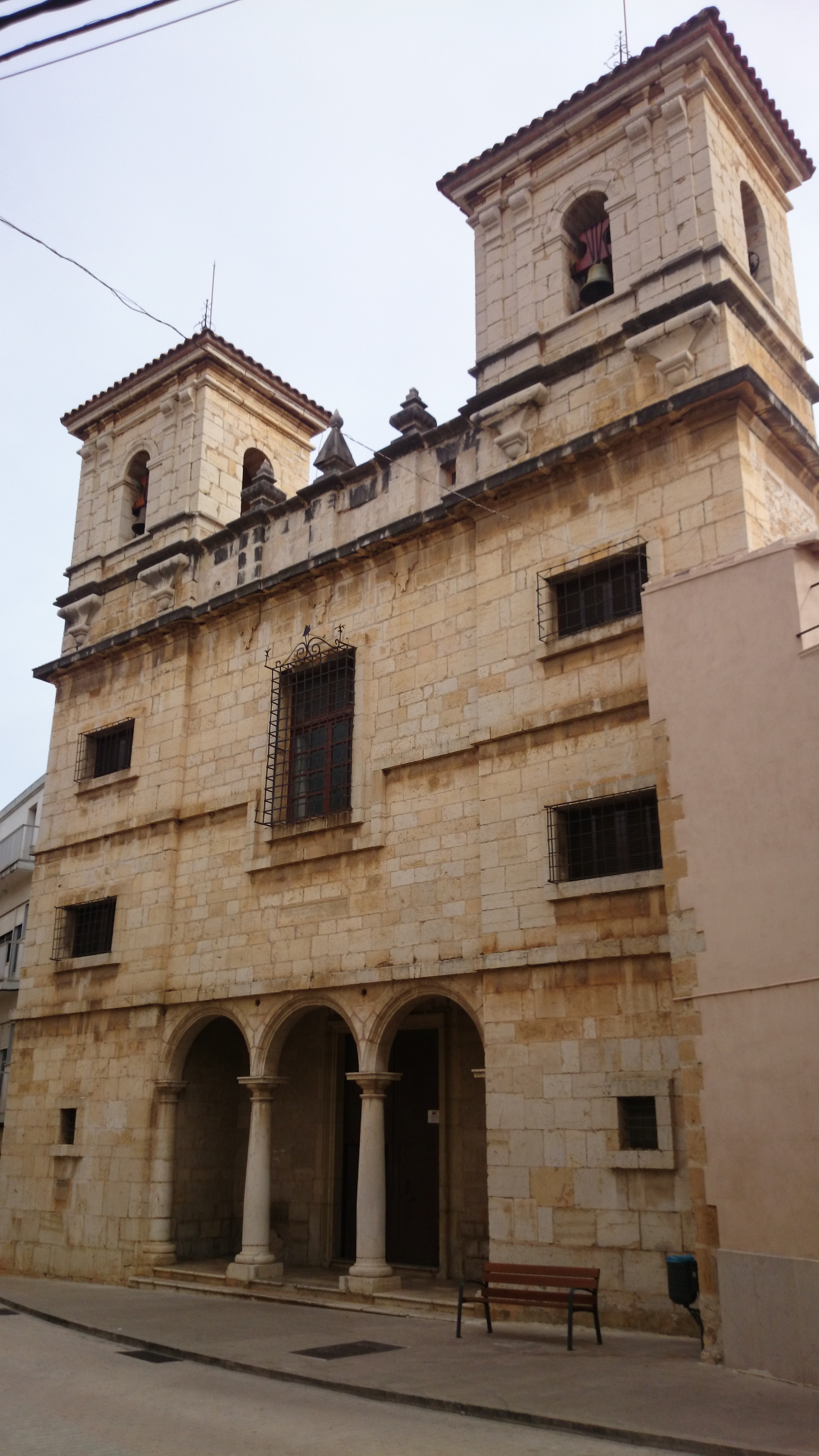 Oglesia-Convento Madres Agustinas